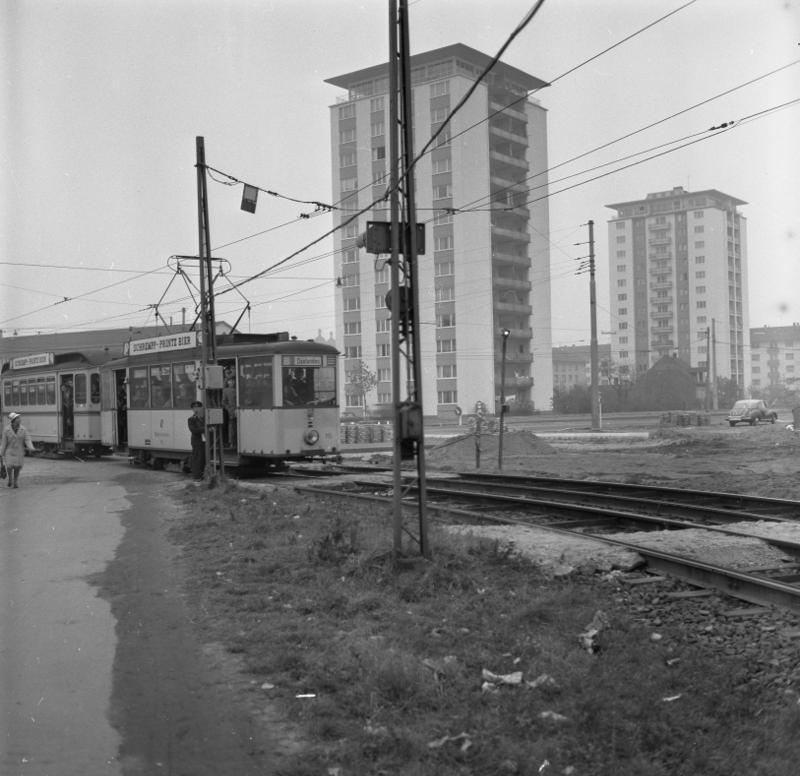 Karlsruhe - Mühlburg Stadtsanierung